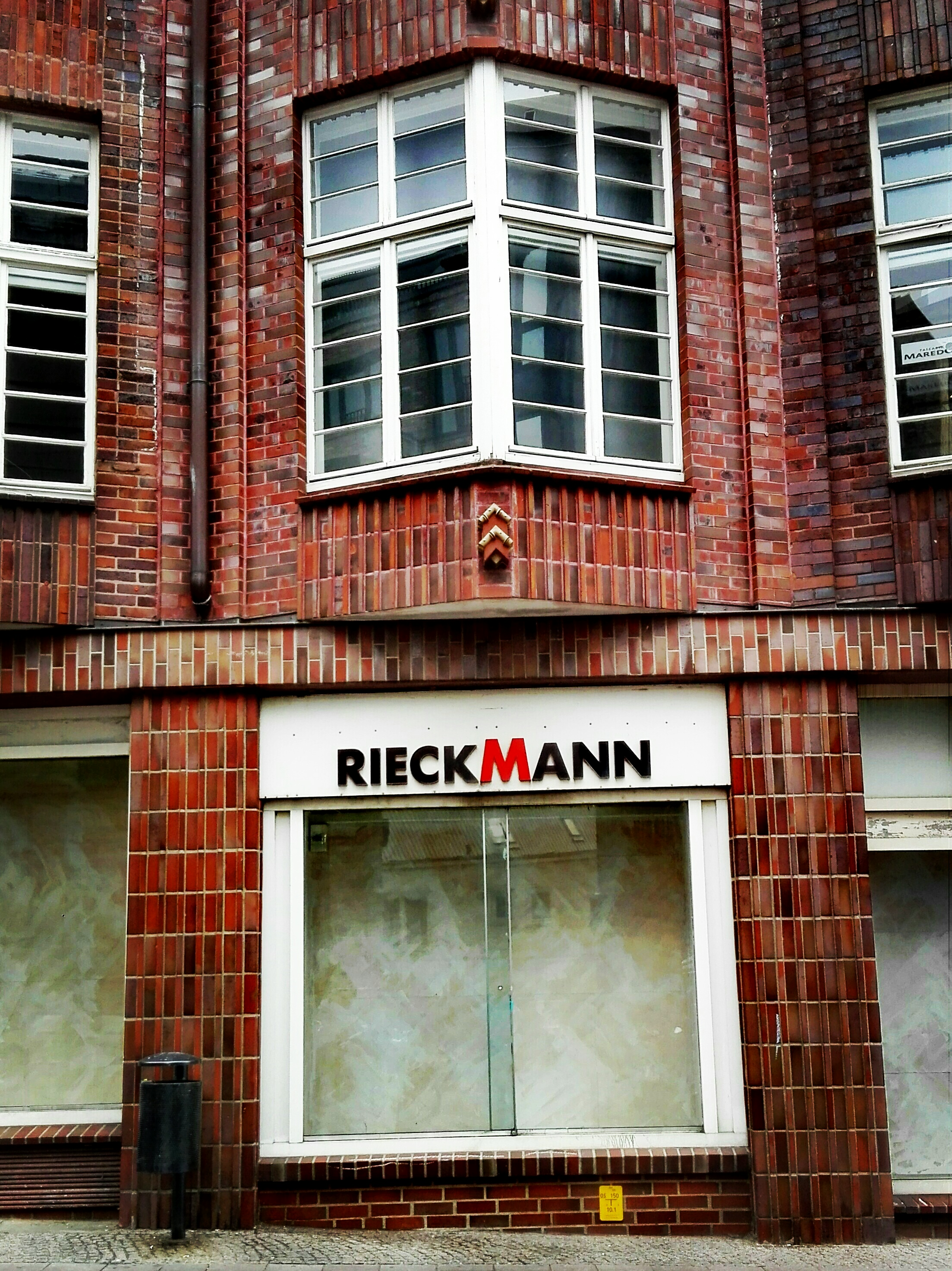 Schaufenster a. D. für den 2011 geschlossenen Herrenausstatter Rieckmann an der Schmiedestraße.